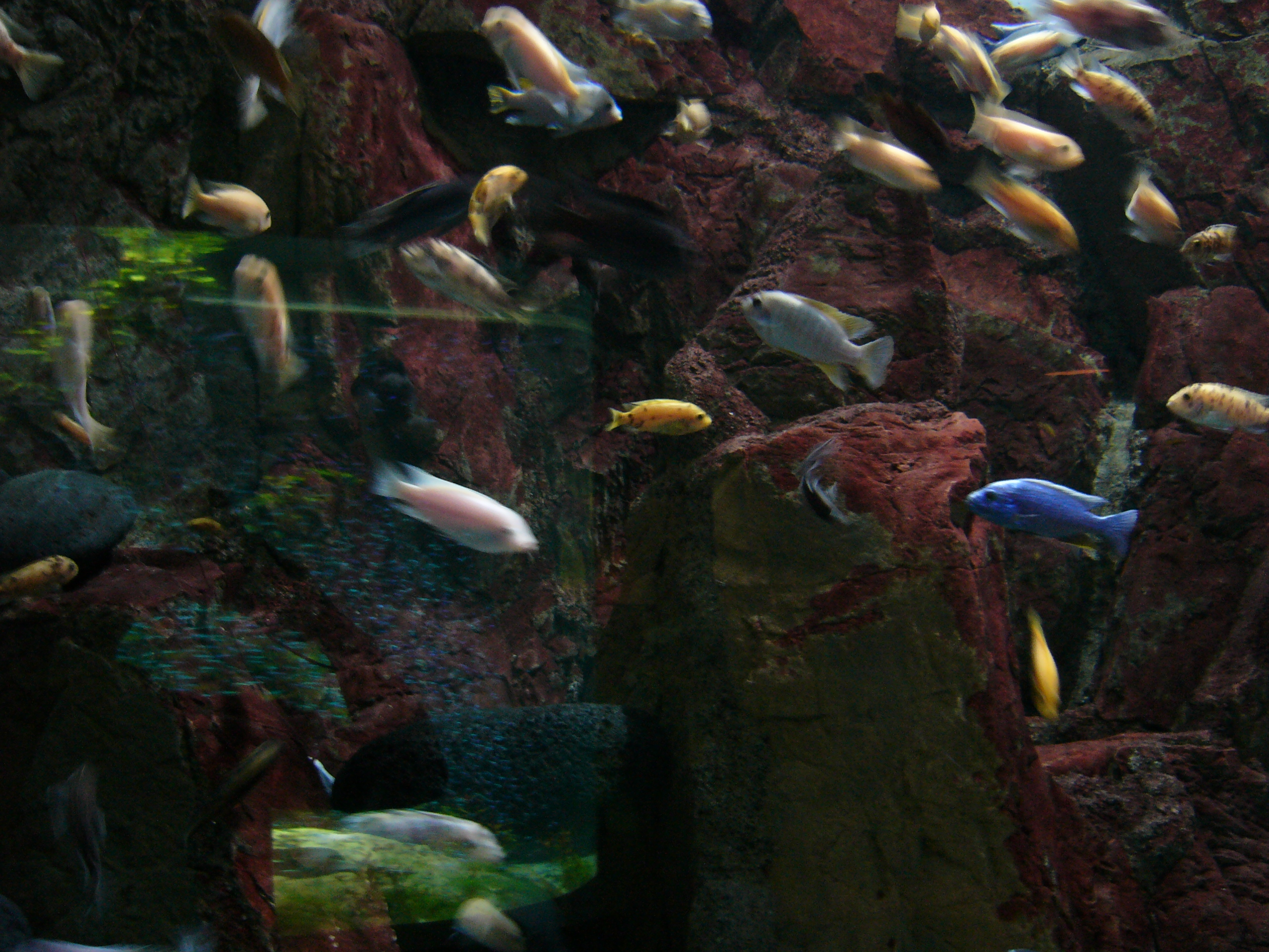 Tenerife: Loro Parque (Puerto de la Cruz) September 2005 Olaf A. Koch own picture